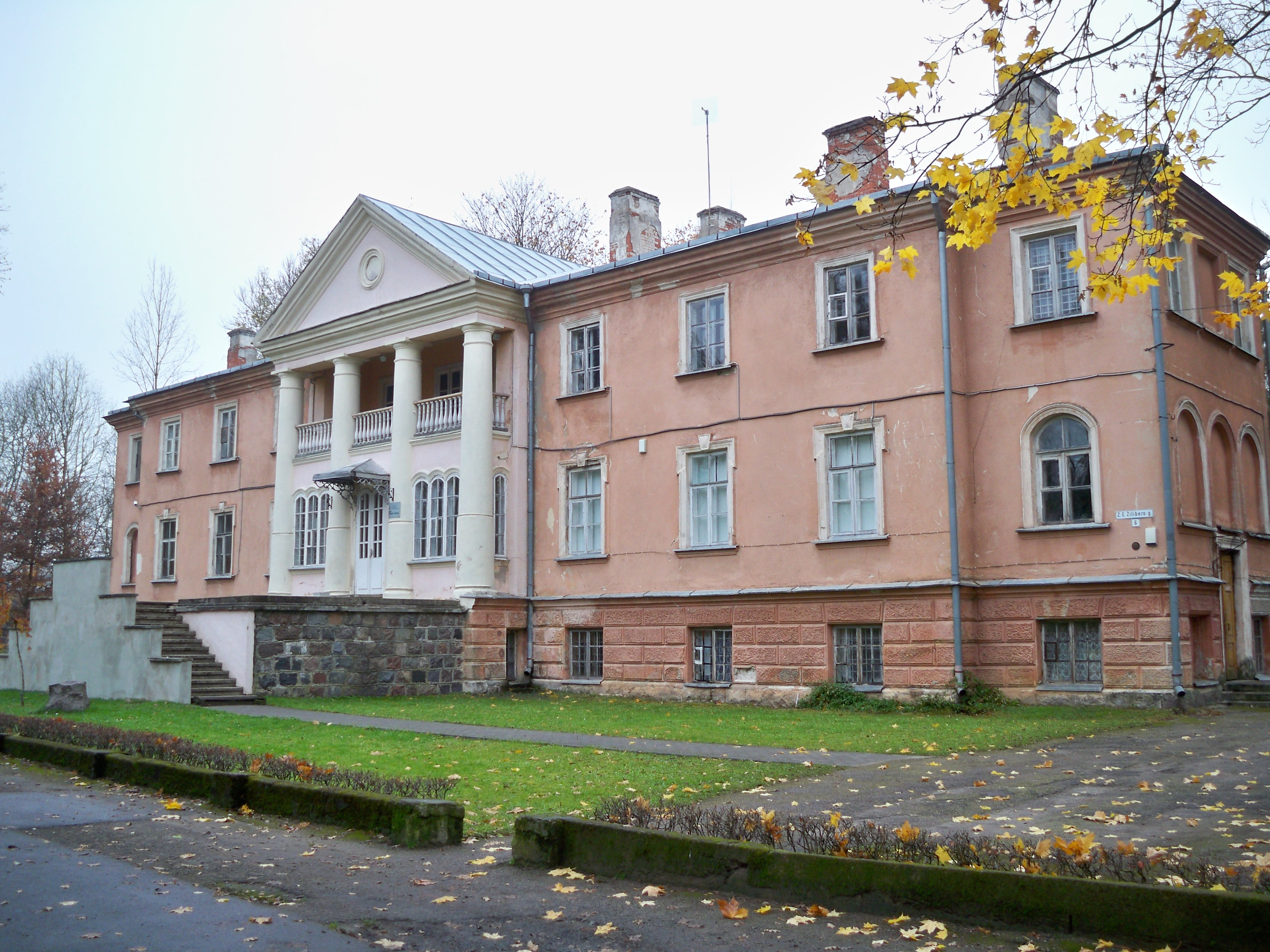 Fredos dvaro rūmai.